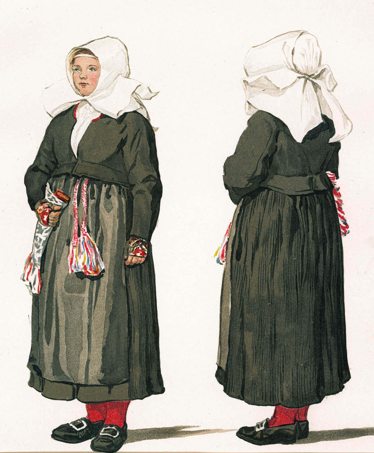 Folkdräkt, högtidsdräkt. Gagnefs socken, Dalarna. Bildtryck efter akvarell av Emelie von Walterstorff.